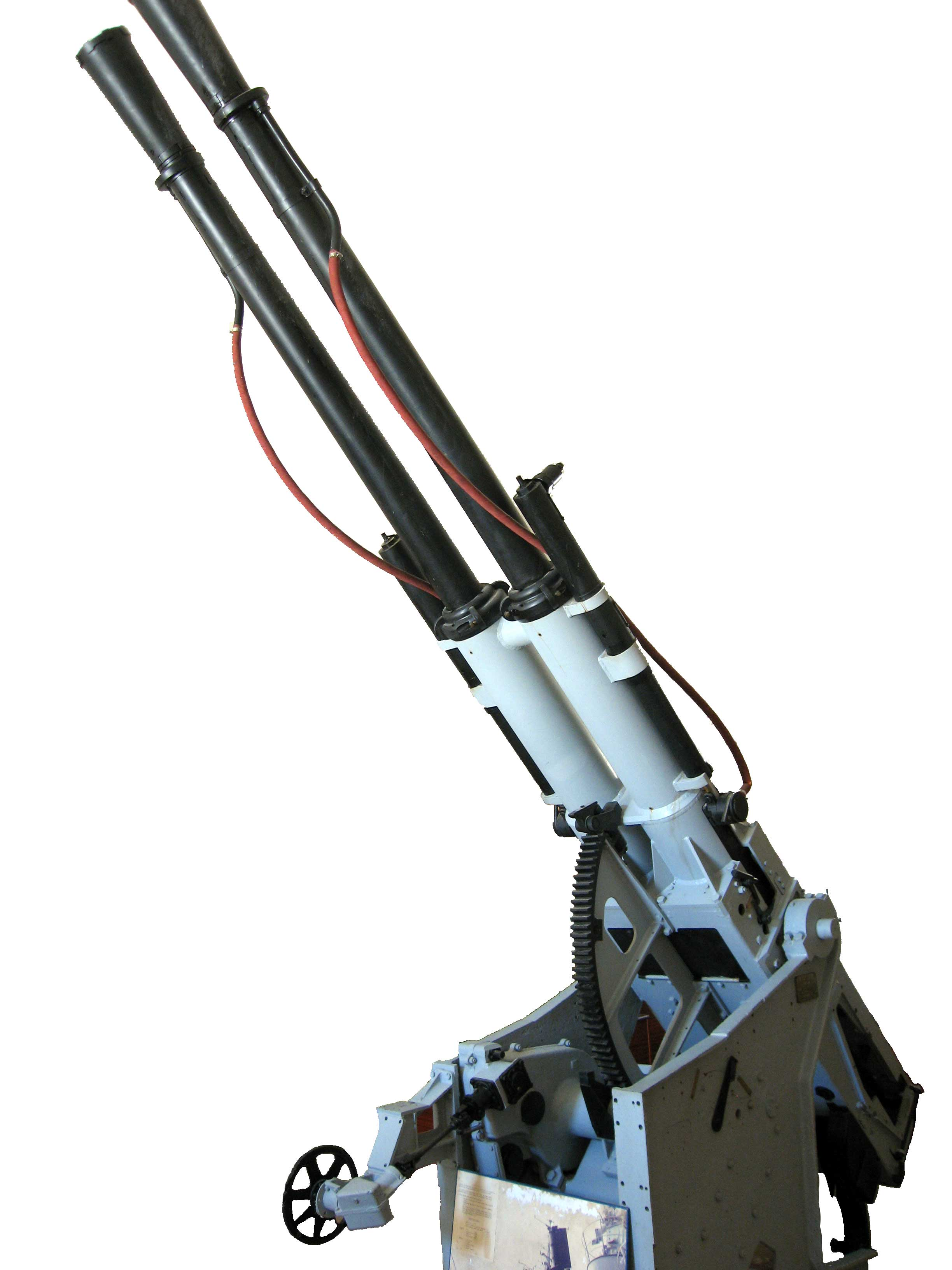 Description : Canon embarqué anti-aérien de 57 mm Place : Musée de Port-Louis, Bretagne, France Date : 2006 Auteur : Pline